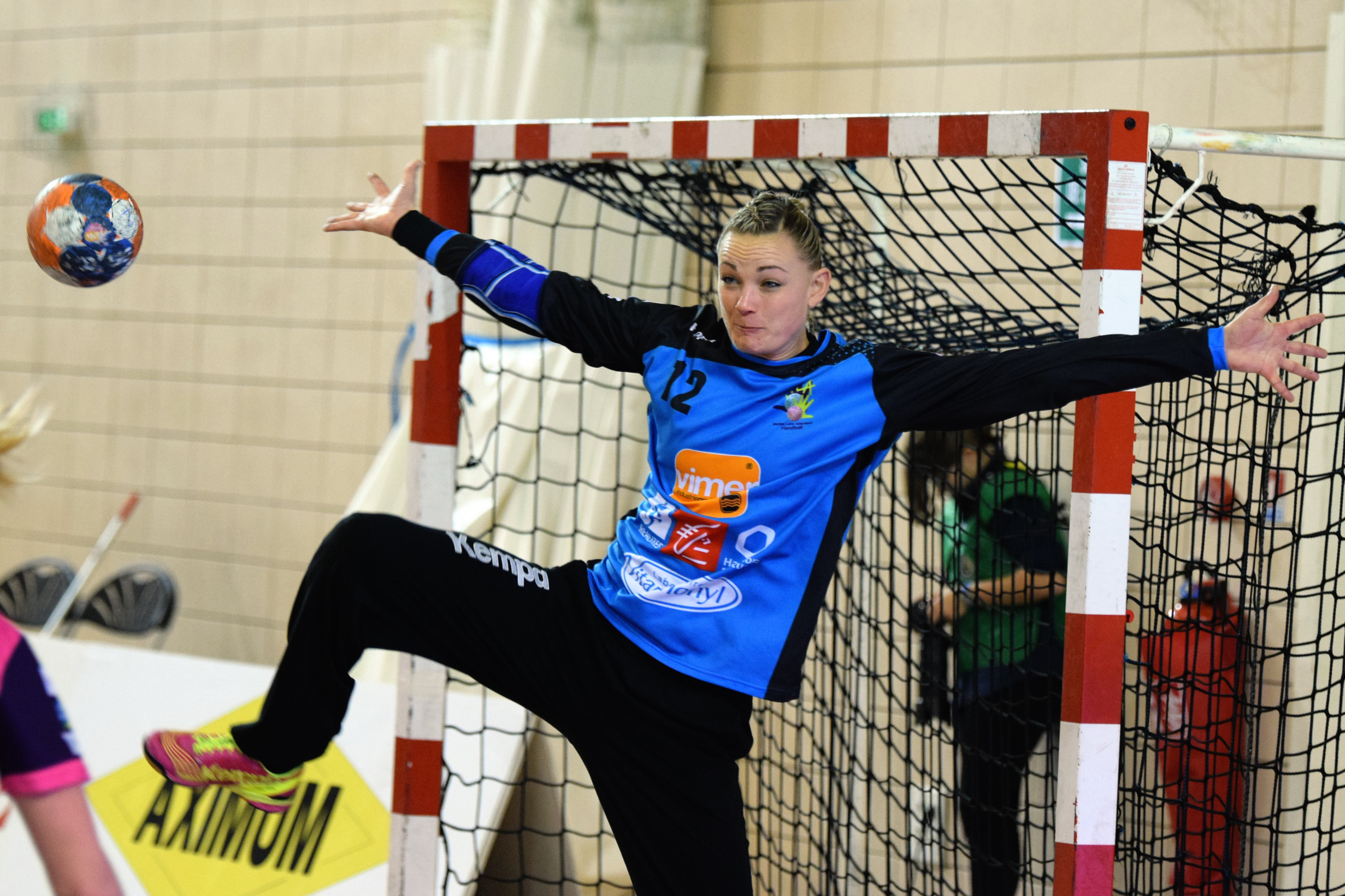 Wendy Obein Le 06 novembre 2015, lors du match Issy Paris Hand / Nantes LAHB comptant pour la 11e journée de LFH. Au stade Robert Carpentier à Issy-les-moulineaux.